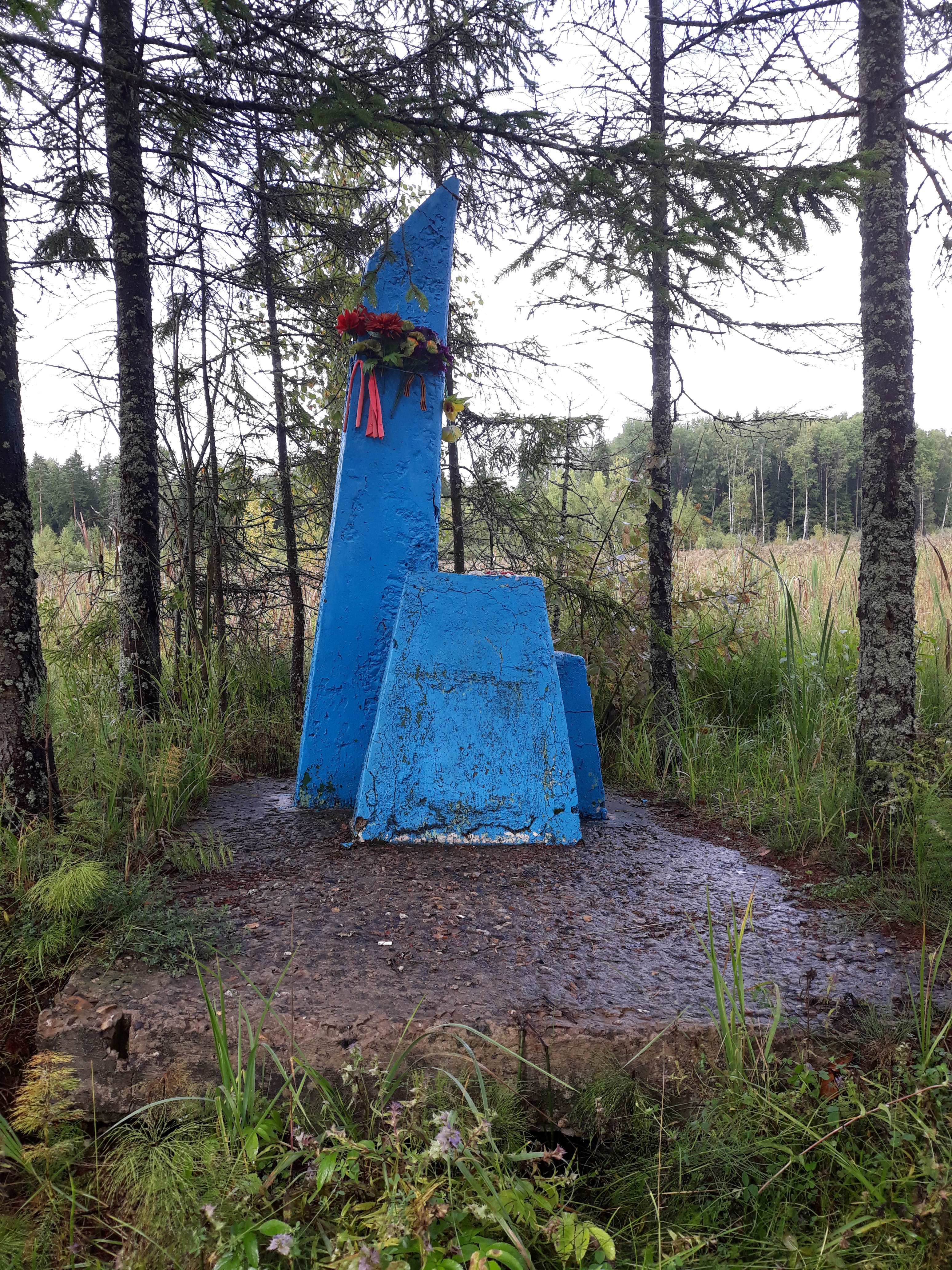 Мемориал Погибшим во времена ВОВ